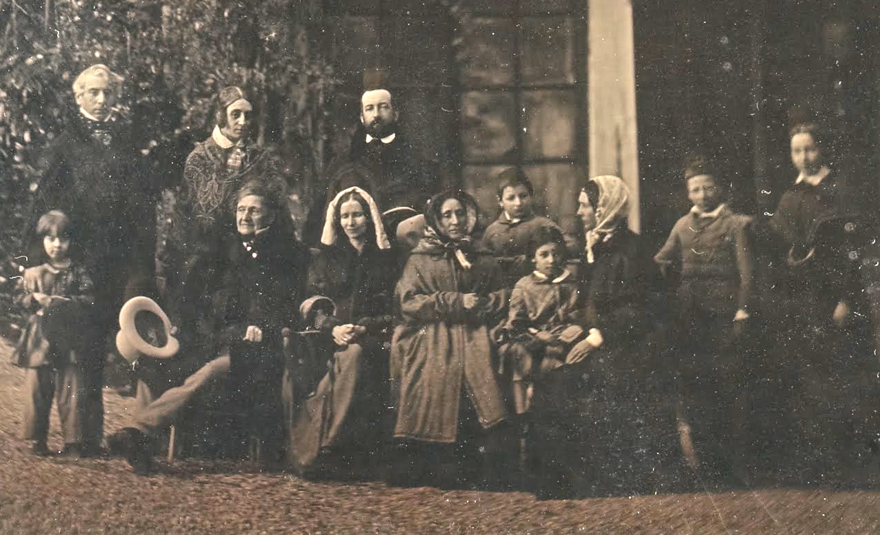 Photo de groupe montrant douze personnes du cercle Eynard-Lullin en 1850